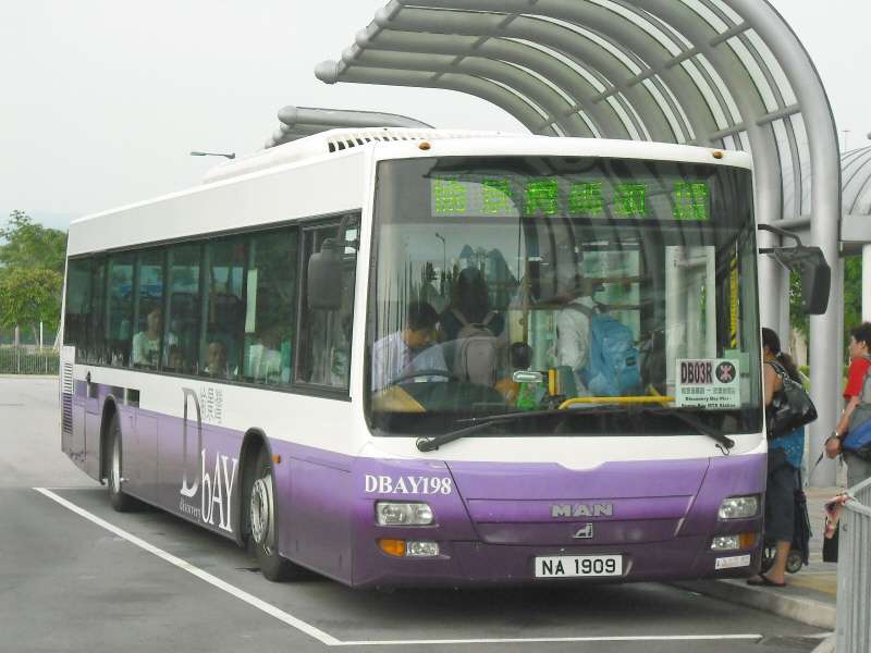 中文（香港）: 愉景灣巴士DB03R線，攝於欣澳鐵路站巴士總站。